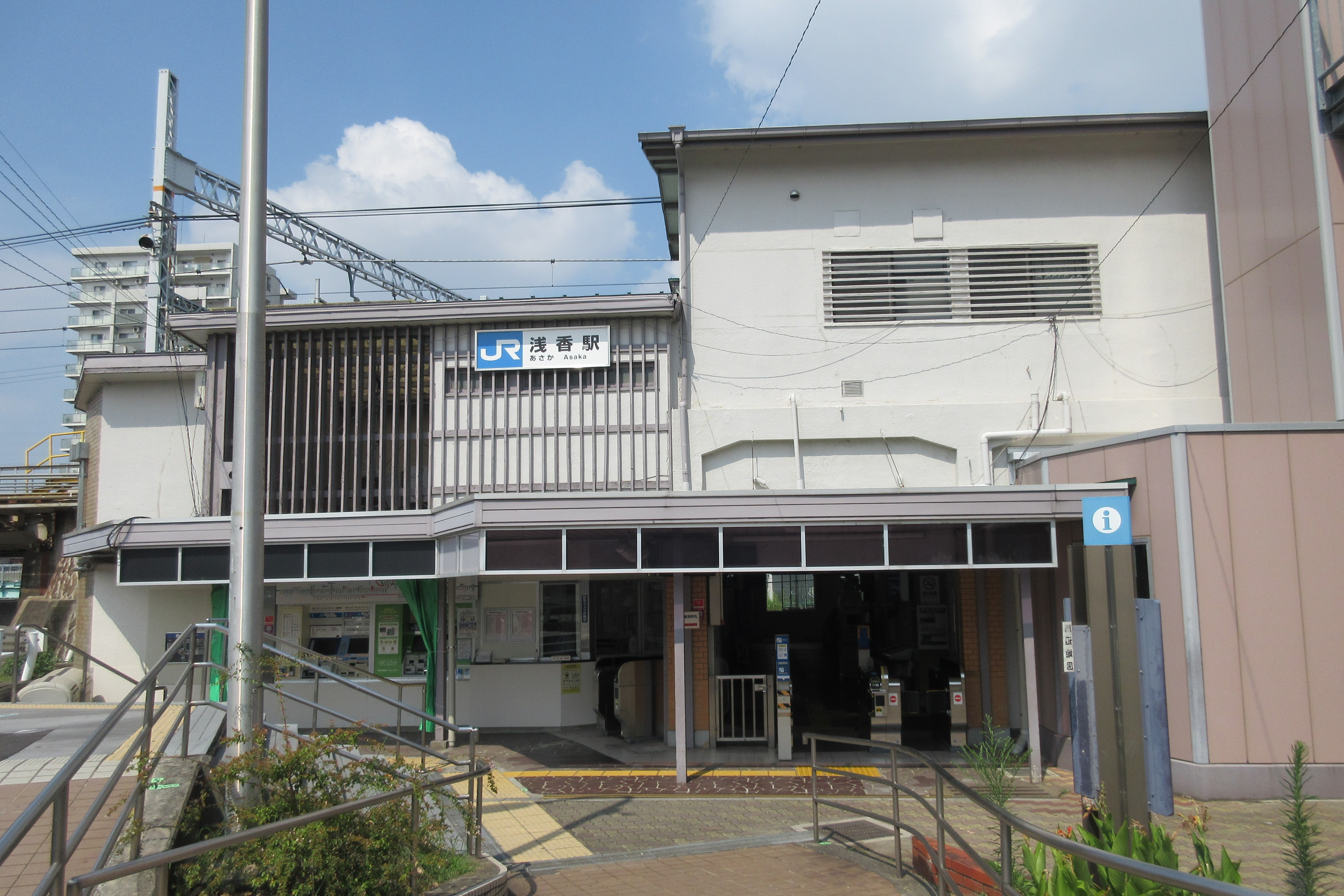 JR阪和線浅香駅